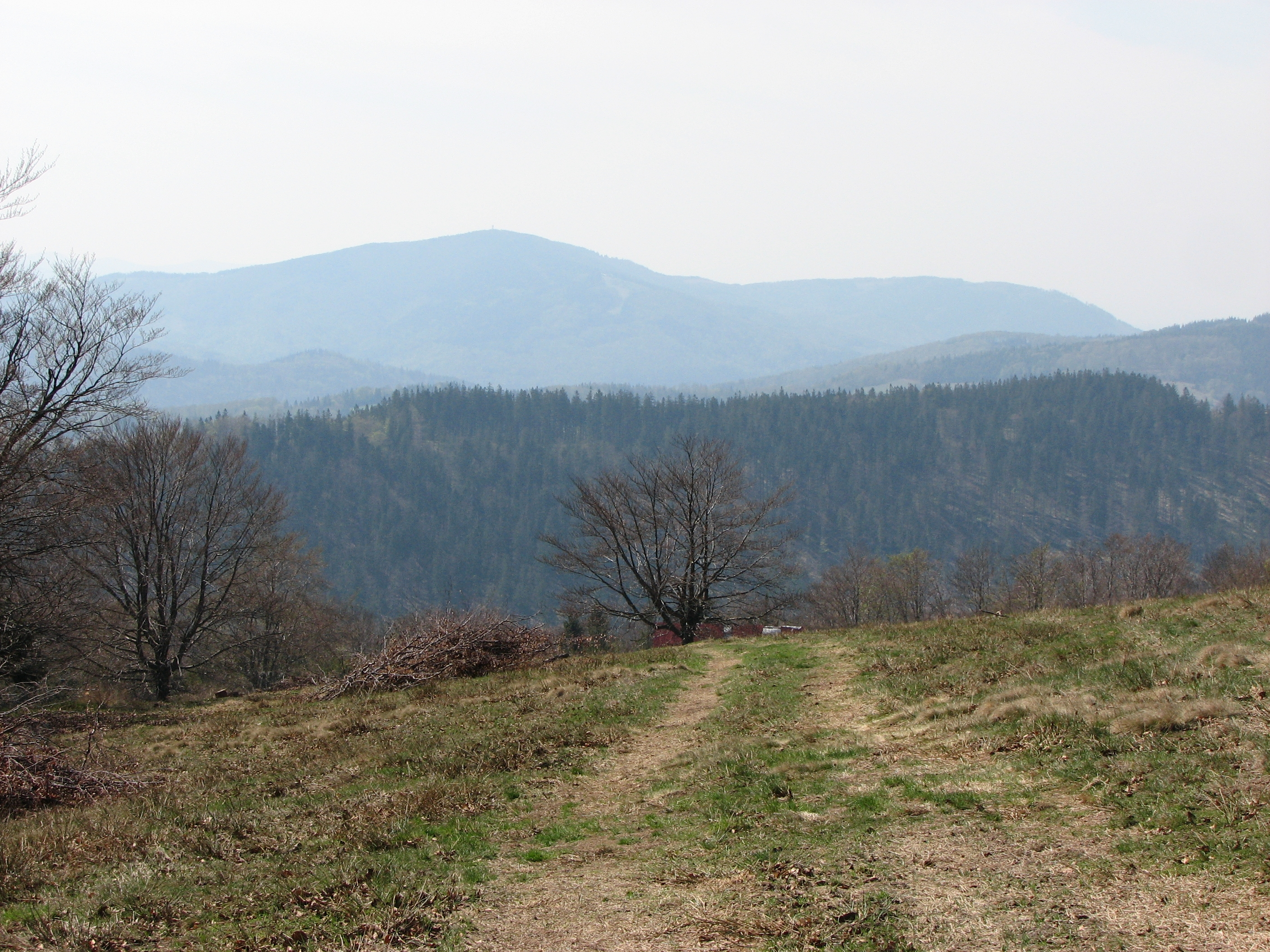 Czantoria Wielka, Beskid Śląski, Polska, Poland